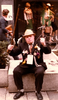 Street singer Jan de Roos in characteristic pose (Heerestraat, Groningen)